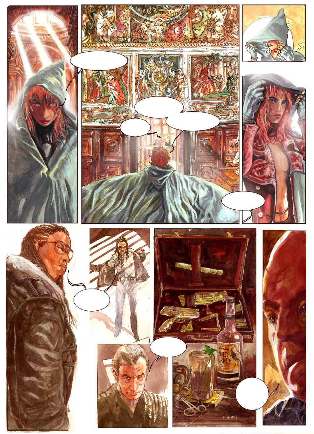 Le ombe di Saturno,tavola a fumetti